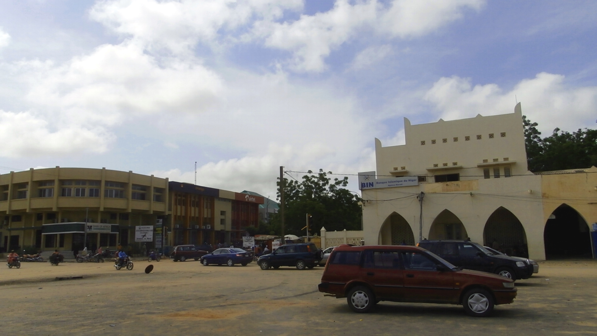 une rue de Maradi